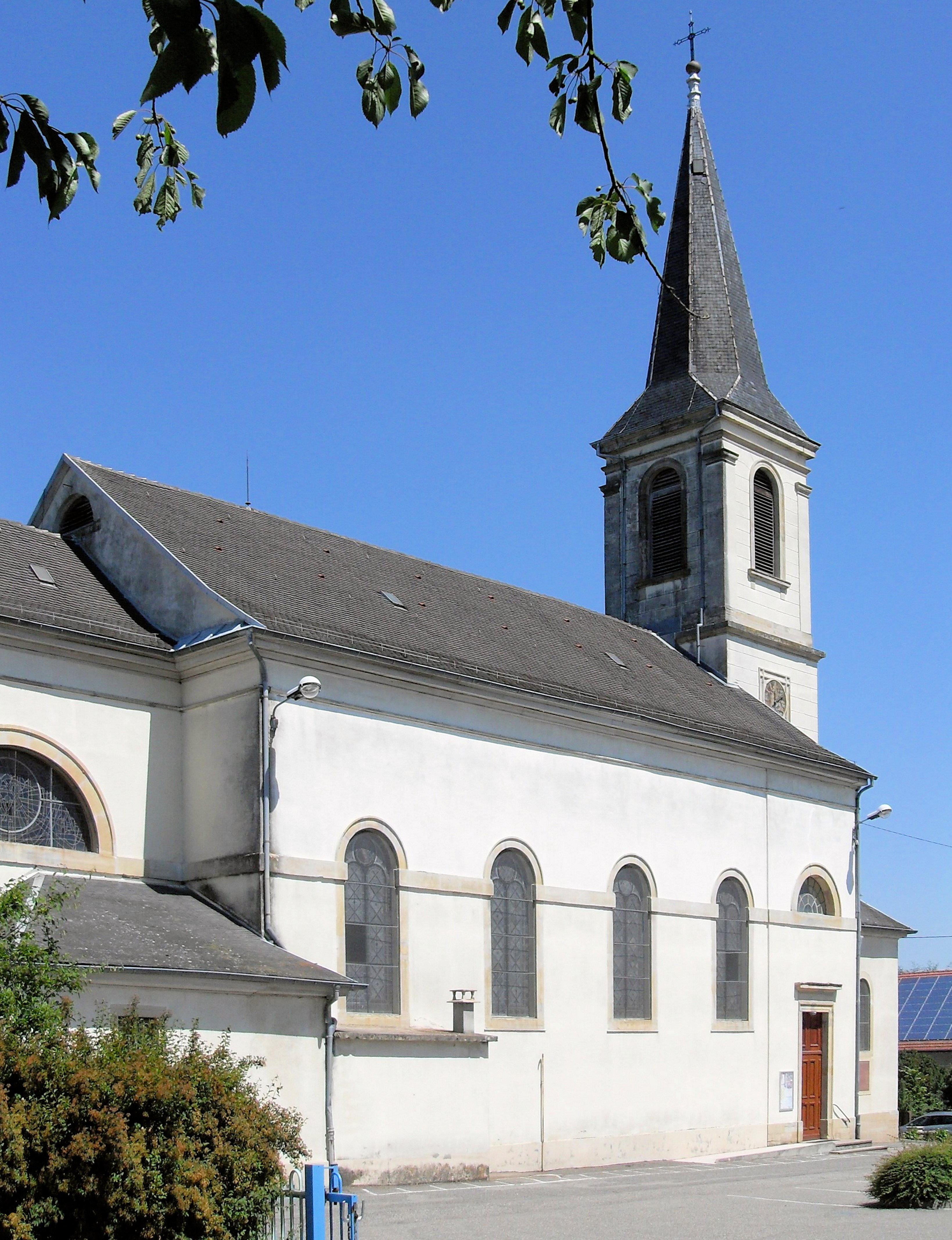 L'église Saint-Augustin à Spechbach-le-BasHaut